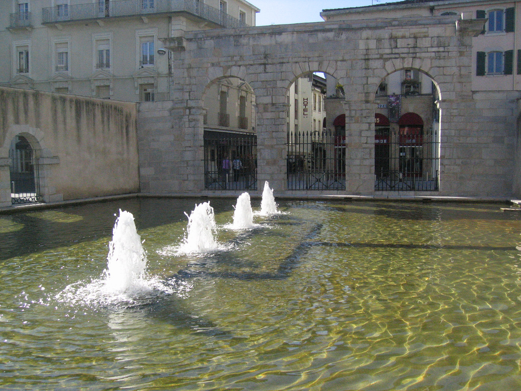 La Fontaine Chaude, Dax, Landes, Gascogne, France